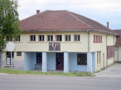 Српски (ћирилица): Д. Горевница:Задружни дом